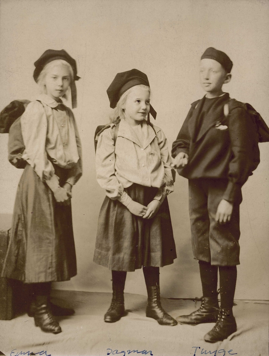 Billedhuggeren Emma Matthiasen som barn, fotografert rundt år 1900 sammen med søsknene Dagmar og Thyge. Fotograf: Christoffer Gade Rude. Bildet inngår i Oslo Museums Byhistoriske samling.